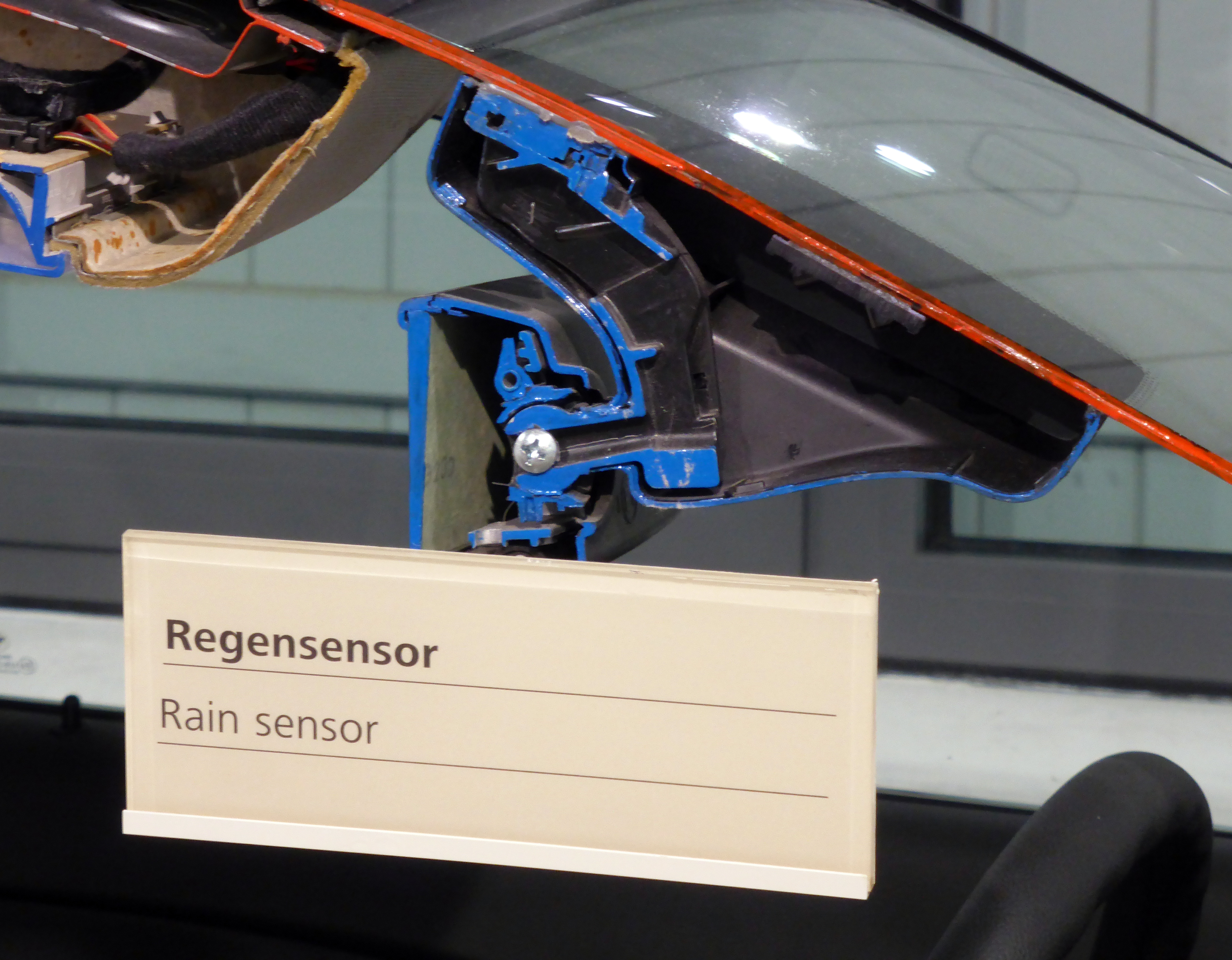 Schnittmodell eines BMW 530d, Baujahr 2009 (BMW E60). Ausgestellt im Deutschen Technikmuseum Berlin. Wikipedianische KulTour am 10. Oktober 2015 in der Ausstellung des Museums.